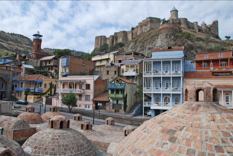 Nariqalan linnoitus ja Abanotubanin kylpylöitä.